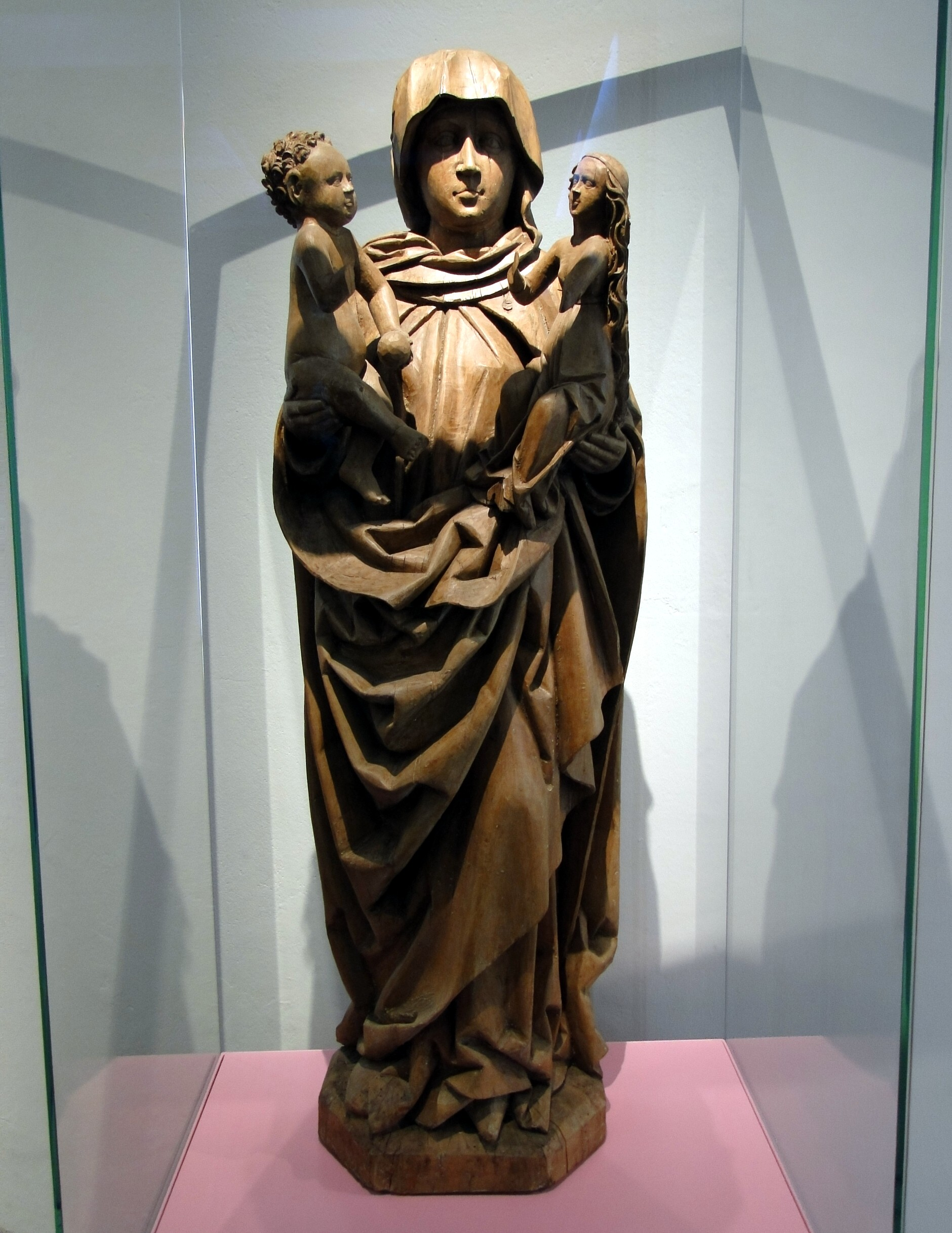 hölzerne Statue der Anna selbdritt, vermutlich aus dem Beinhaus der alten Frauenkirche in Dresden